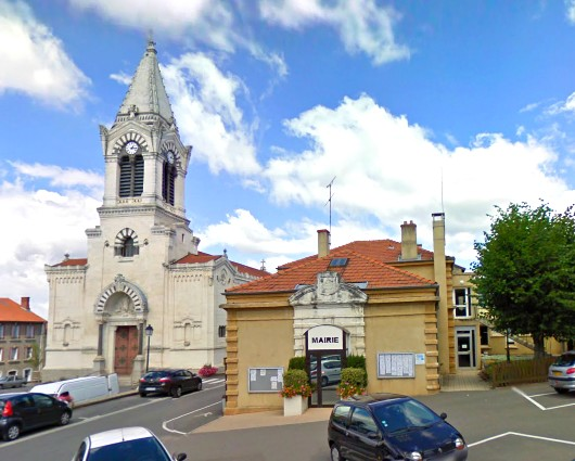 Vue d'une partie du village de St-Héand (monuments vieux de plus de 100 ans).